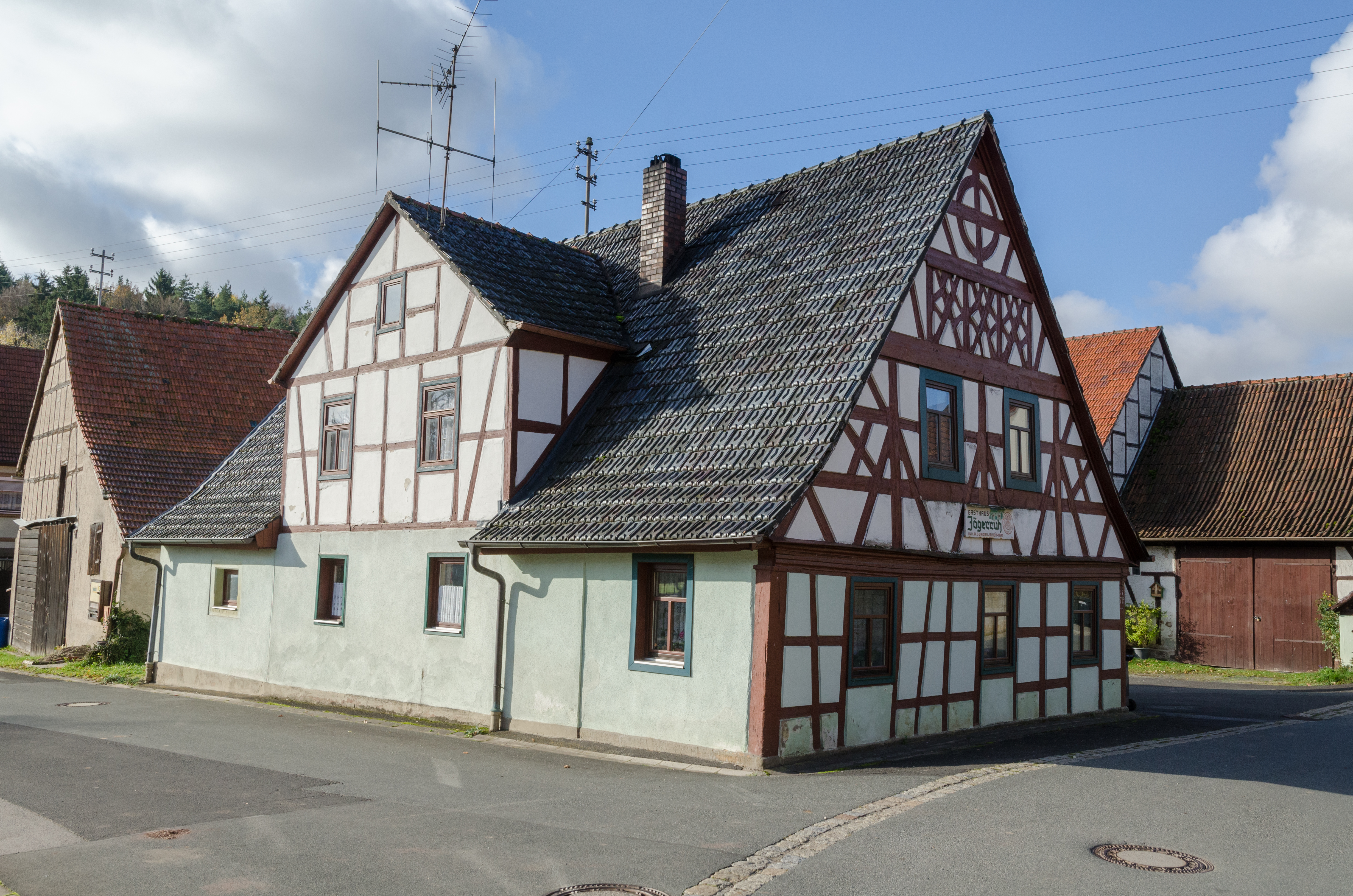 Mauschendorf, Geracher Straße 3